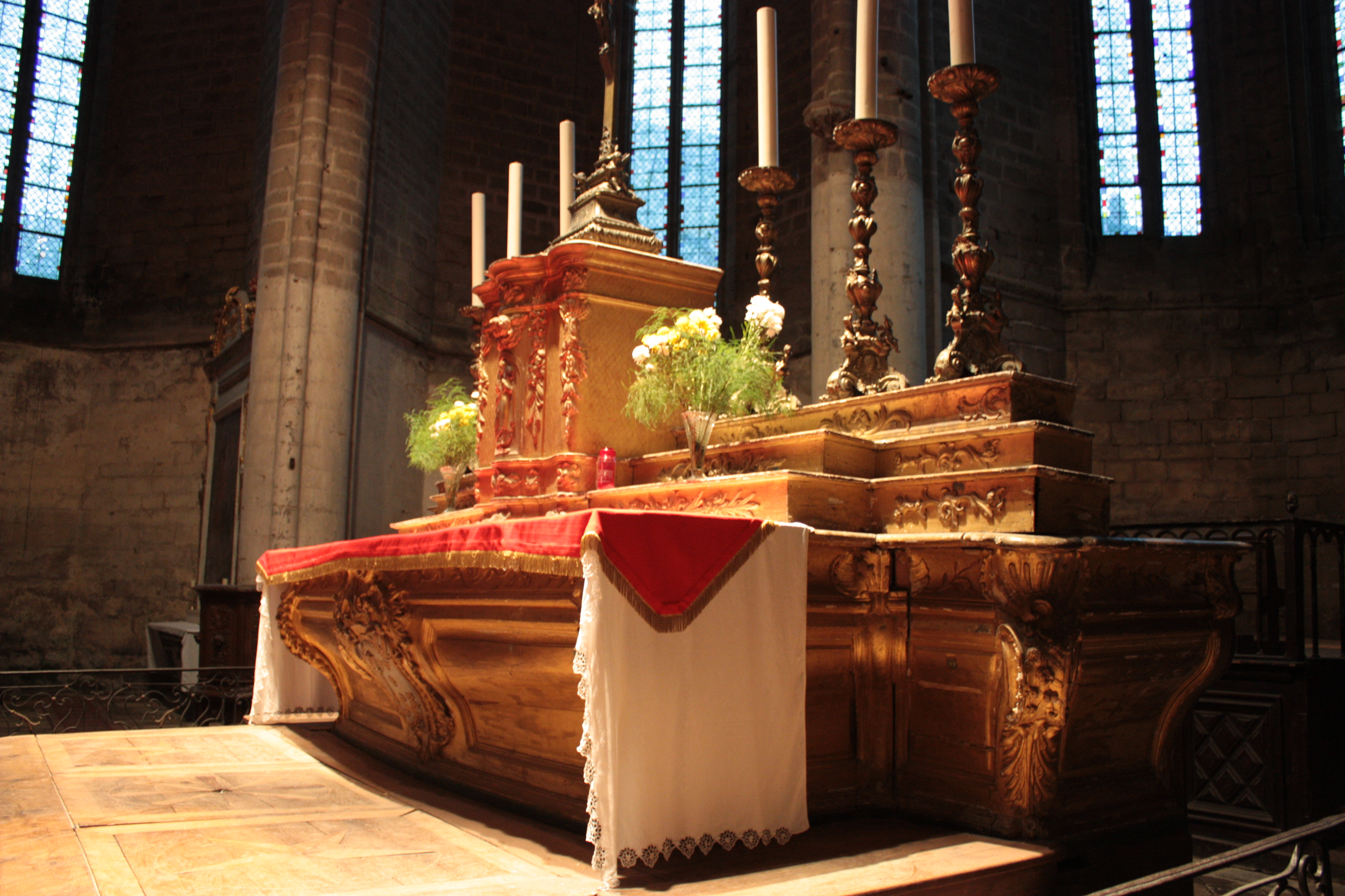 Autel majeur de La Chaise-Dieu